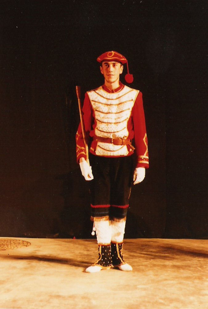 Imagen de osaba iñaki (ELAI ALAI)